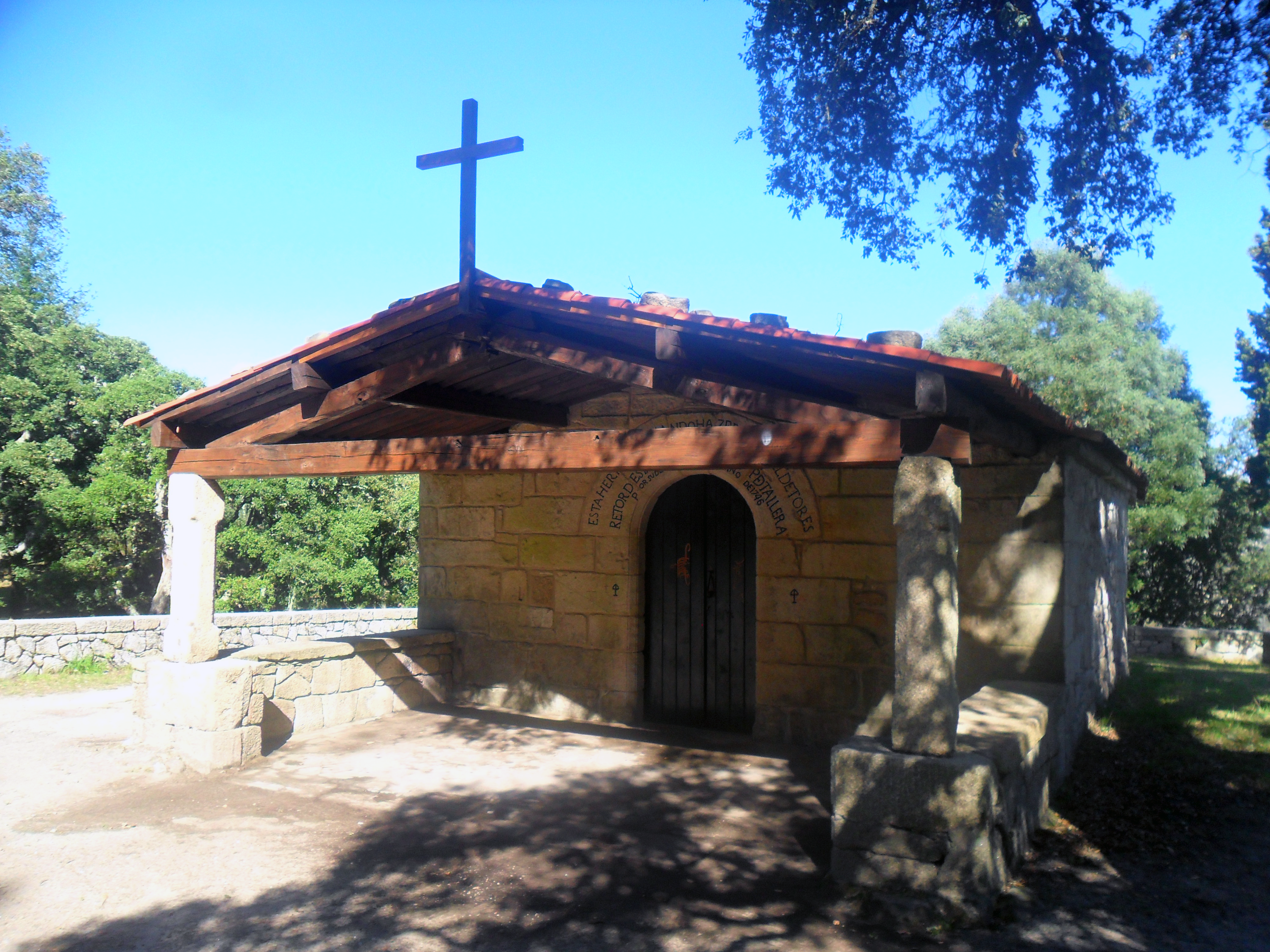 Capela no monte de san Mamede, Galicia, España